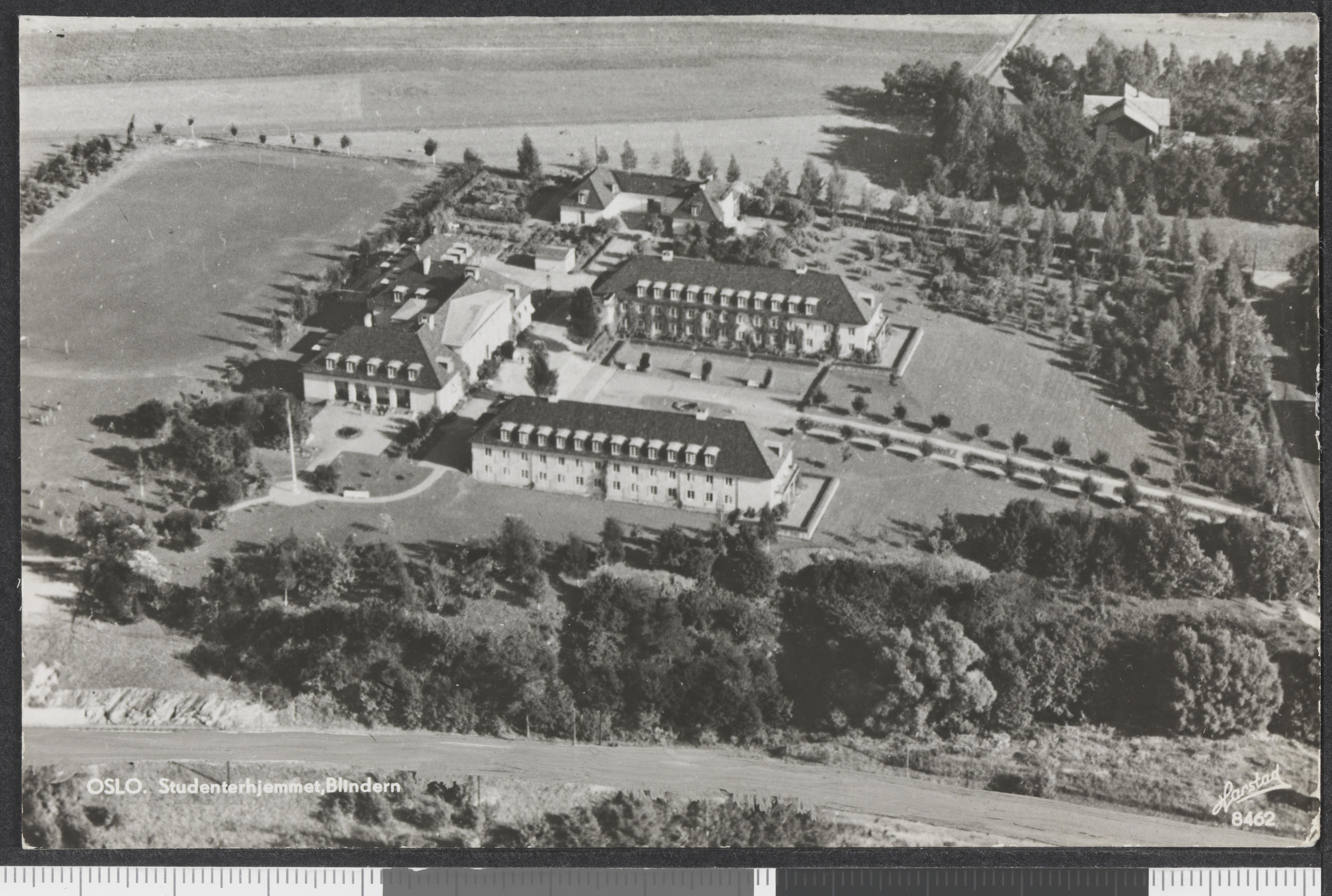 Bildet er hentet fra Nasjonalbibliotekets bildesamling Blindern, Oslo, Oslo